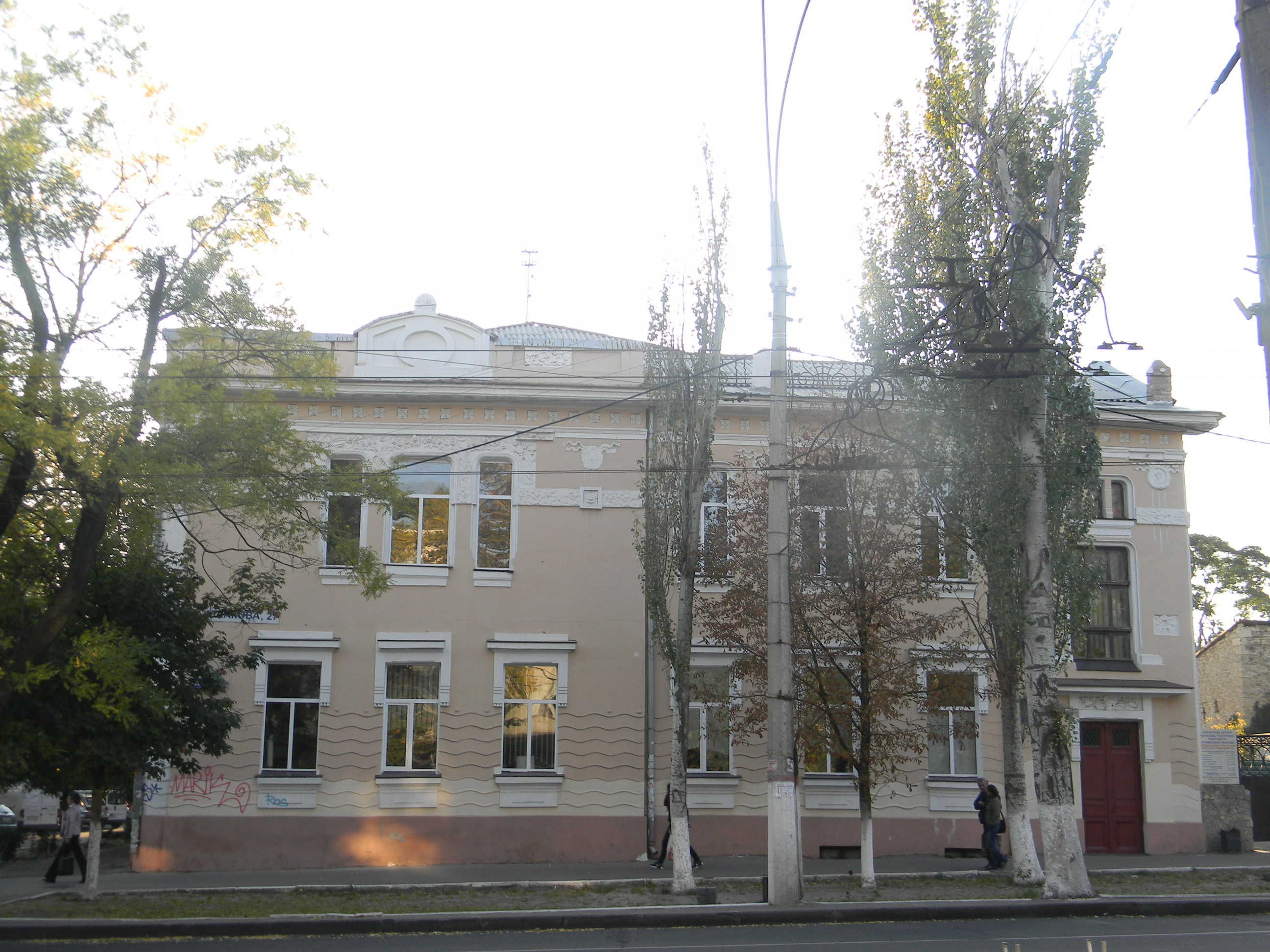 Житловий будинок (мур.), Херсон, пр-т Ушакова, 27